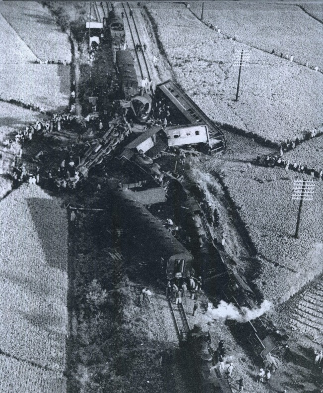 六軒事故現場